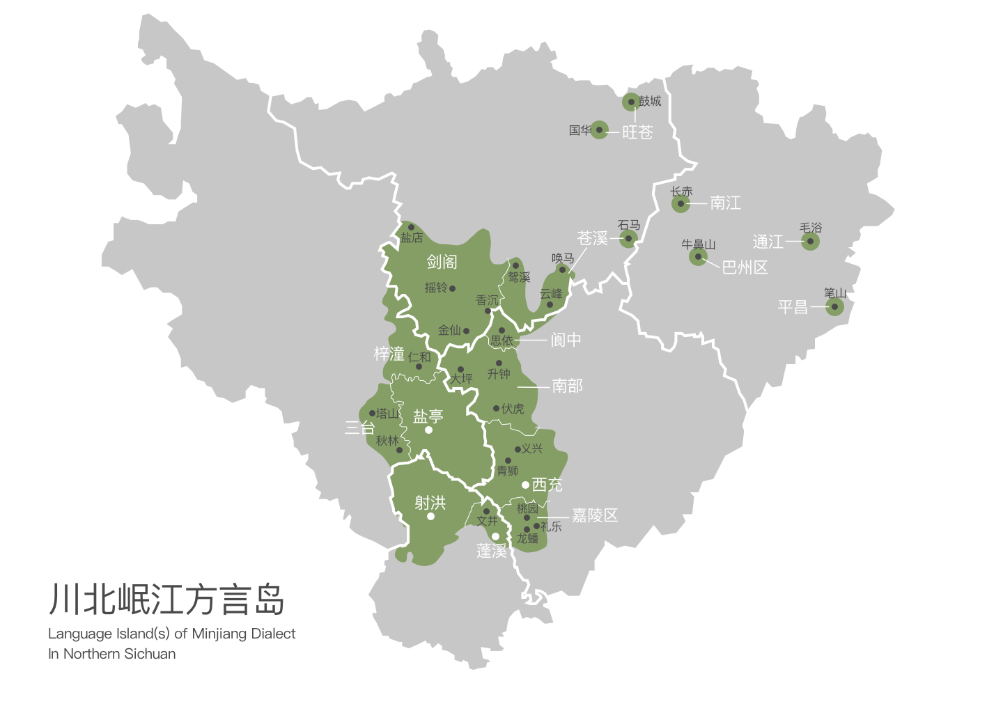 川北岷江方言岛地图。该方言岛覆盖西充、射洪、盐亭、剑阁、苍溪、南部、阆中、嘉陵区、蓬溪、巴州区、南江、通江等县市区，受明清四川移民运动影响较小，是较早期四川方言的存留